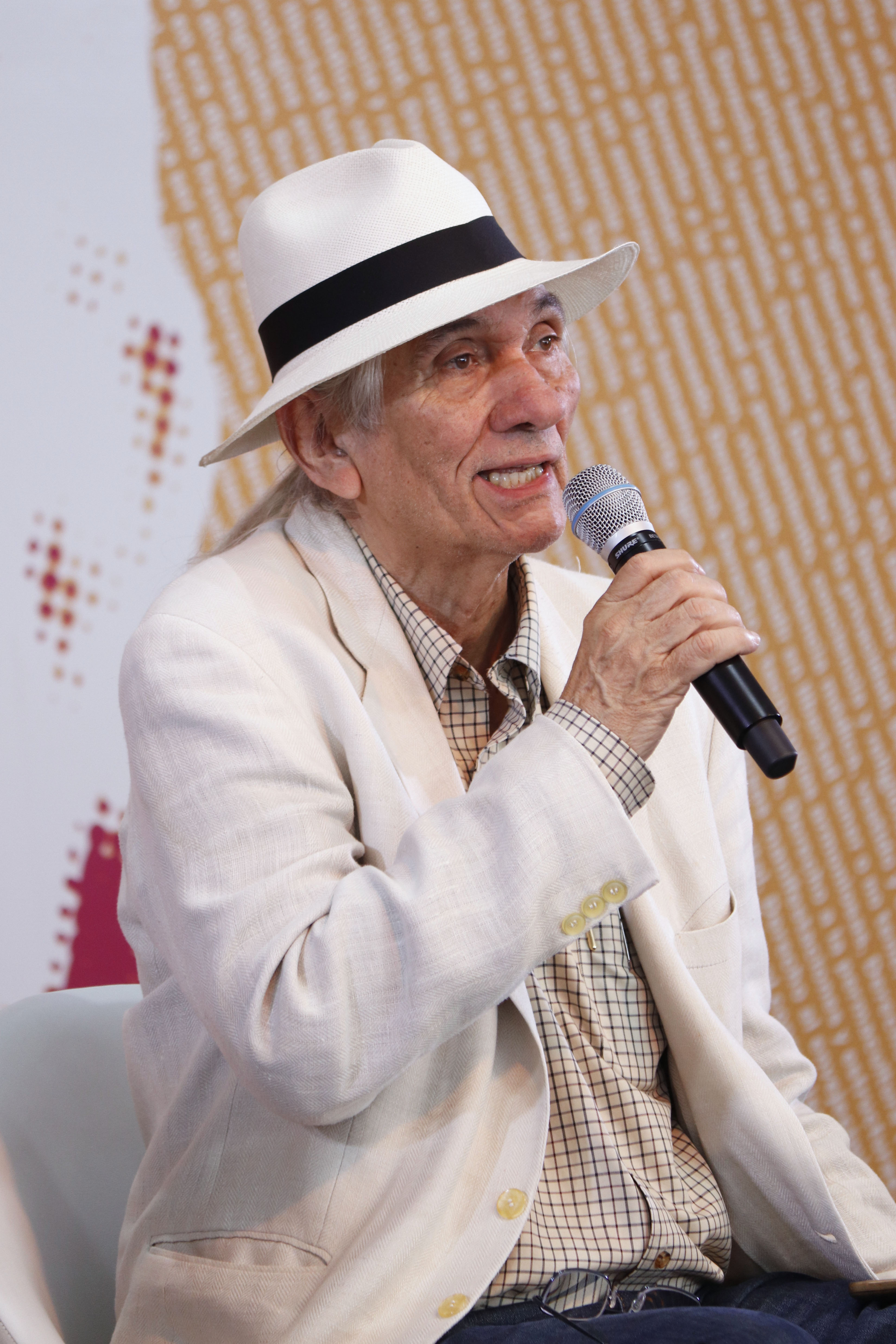 Sábado 13 de octubre 2018. En el foro Sergio Pitol, se realizó la lectura de poesía cubano-mexicana. Por parte de Cuba participaron: Odette Alonso, Margarita Sánchez, Ernesto Fundora y Waldo Leyva. Por México: Eduardo Langagne, Diana del Ángel y Julia Piastro. Fotografía: David Sánchez / Secretaría de Cultura CDMX.